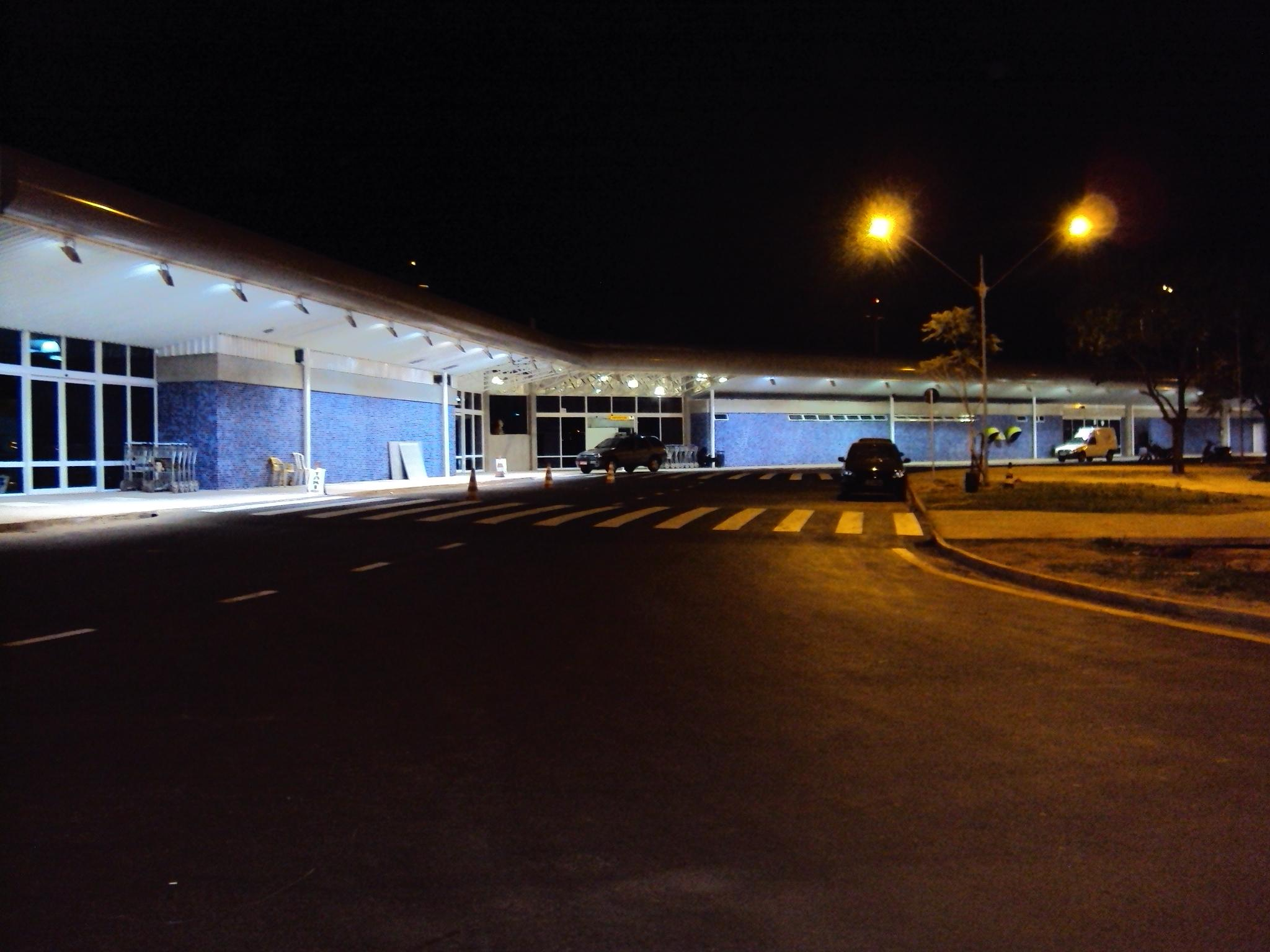 Aeroporto Leite Lopes - Novo TPS 1